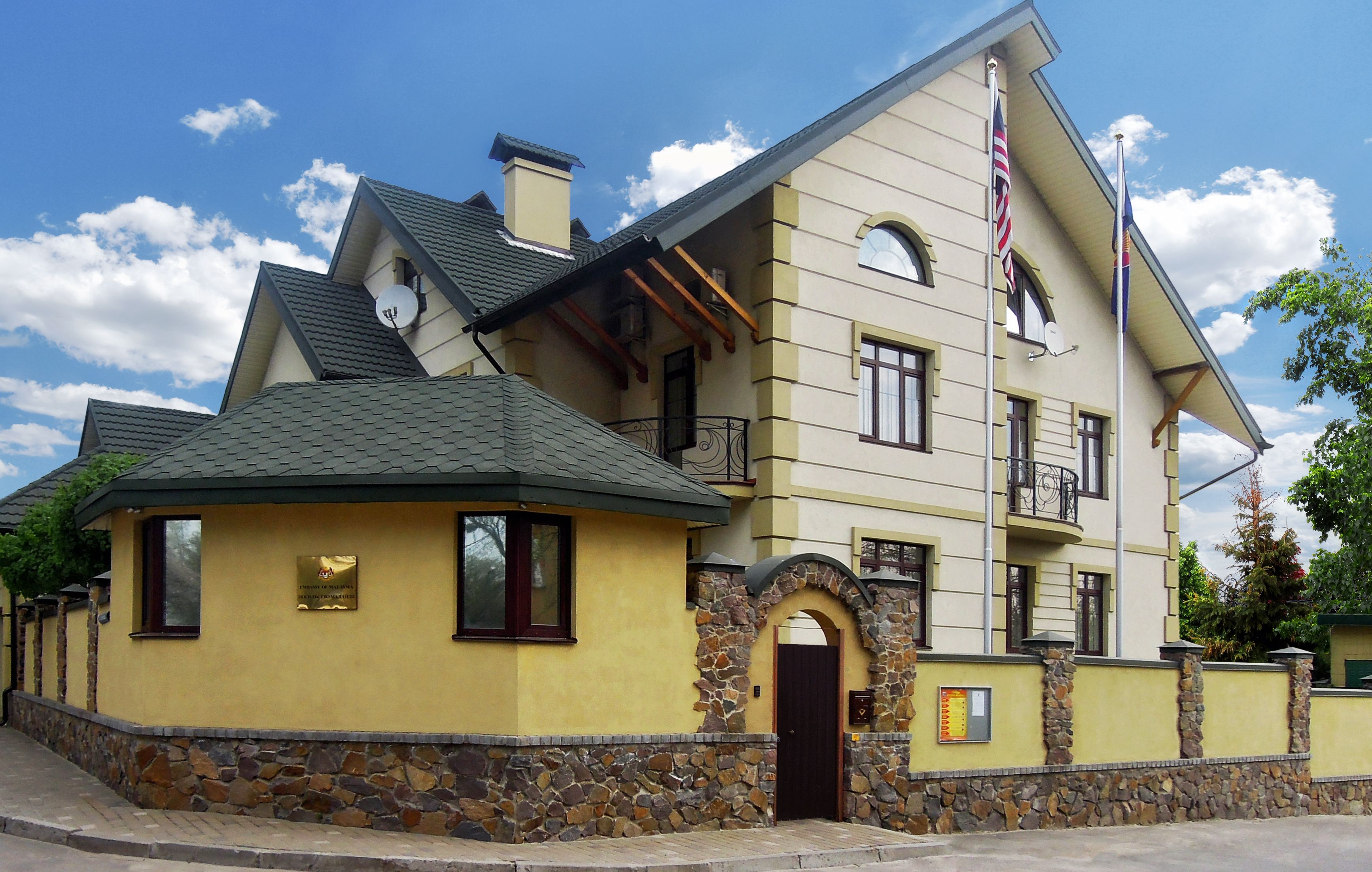 Посольство Малайзії в Україні (вид ззовні)